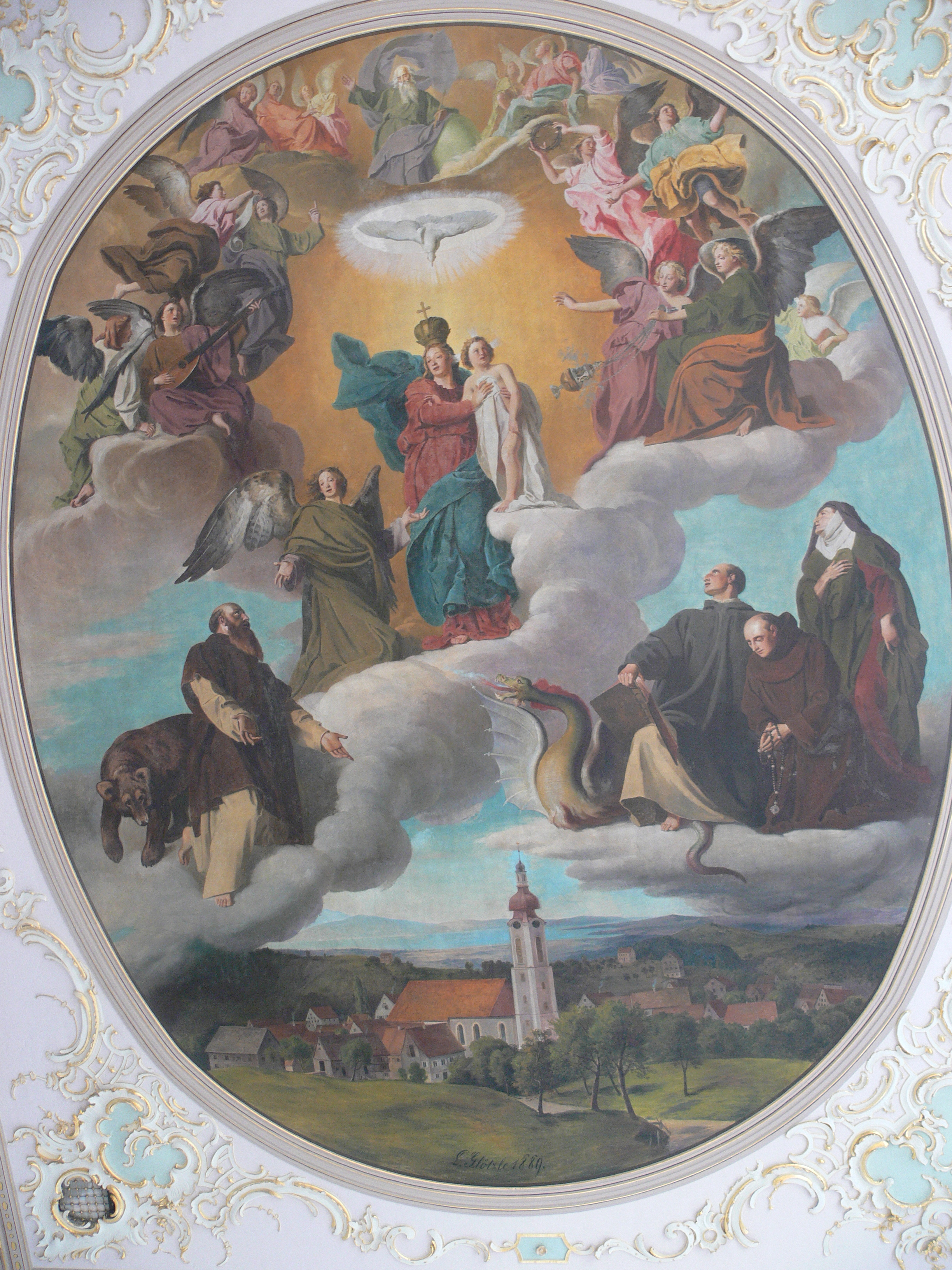 Pfarrkirche St. Gallus, Scheidegg: Deckengemälde im Langhaus. Ludwig Glötzle: Die Himmelskönigin mit dem Kinde nebst dem hl. Gallus (mit Bär) und dem hl. Magnus (mit dem Drachen), schwebend über Scheidegg, 1889